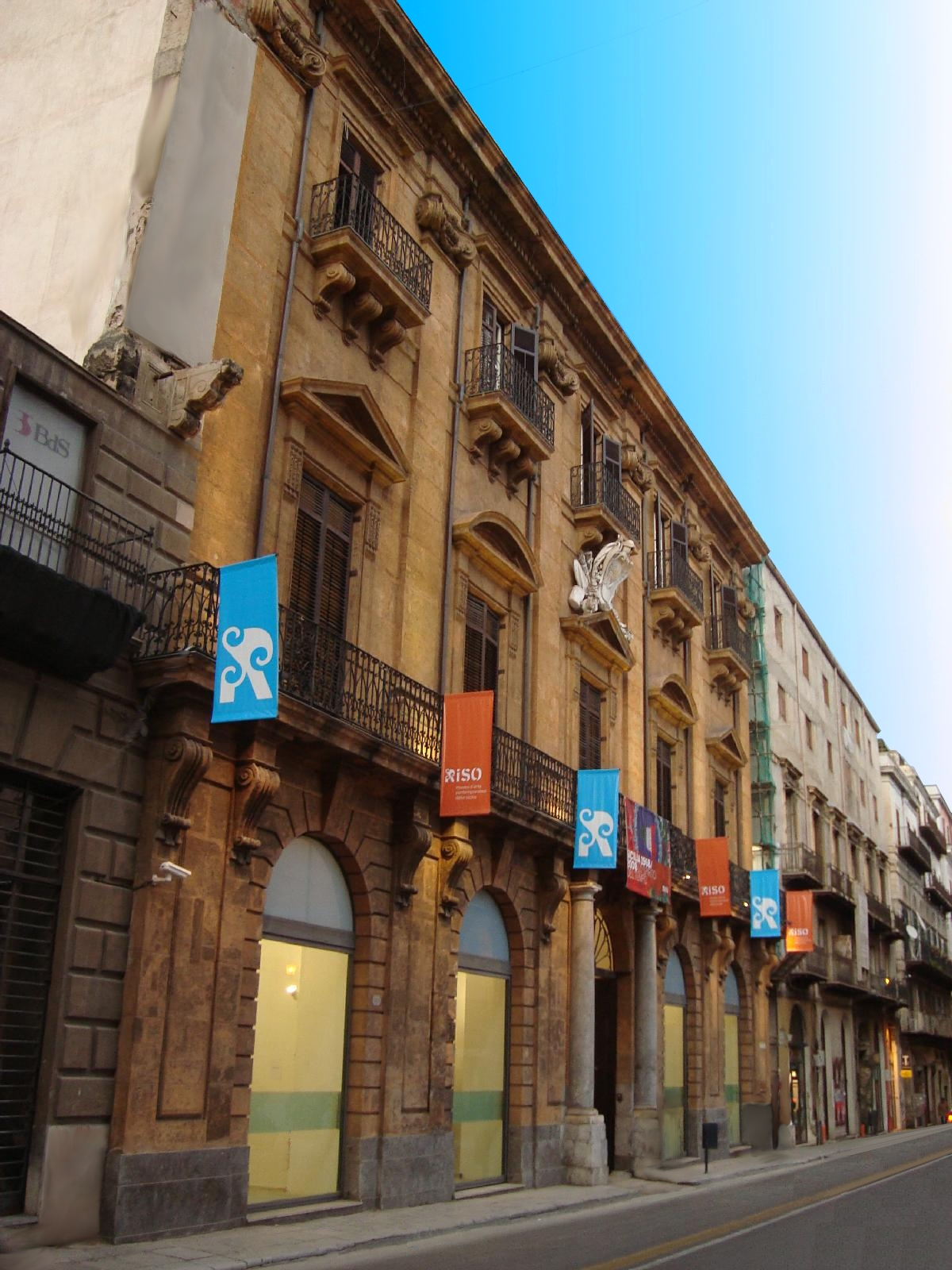 Palazzo Belmonte Riso a Palermo è sede del RISO Museo d'Arte Contemporanea della Sicilia. In stile neoclassico, l'edificio venne progettato nel 1784 dall'architetto Giuseppe Venanzio Marvuglia per Giuseppe Emanuele Ventimiglia principe di Belmonte.